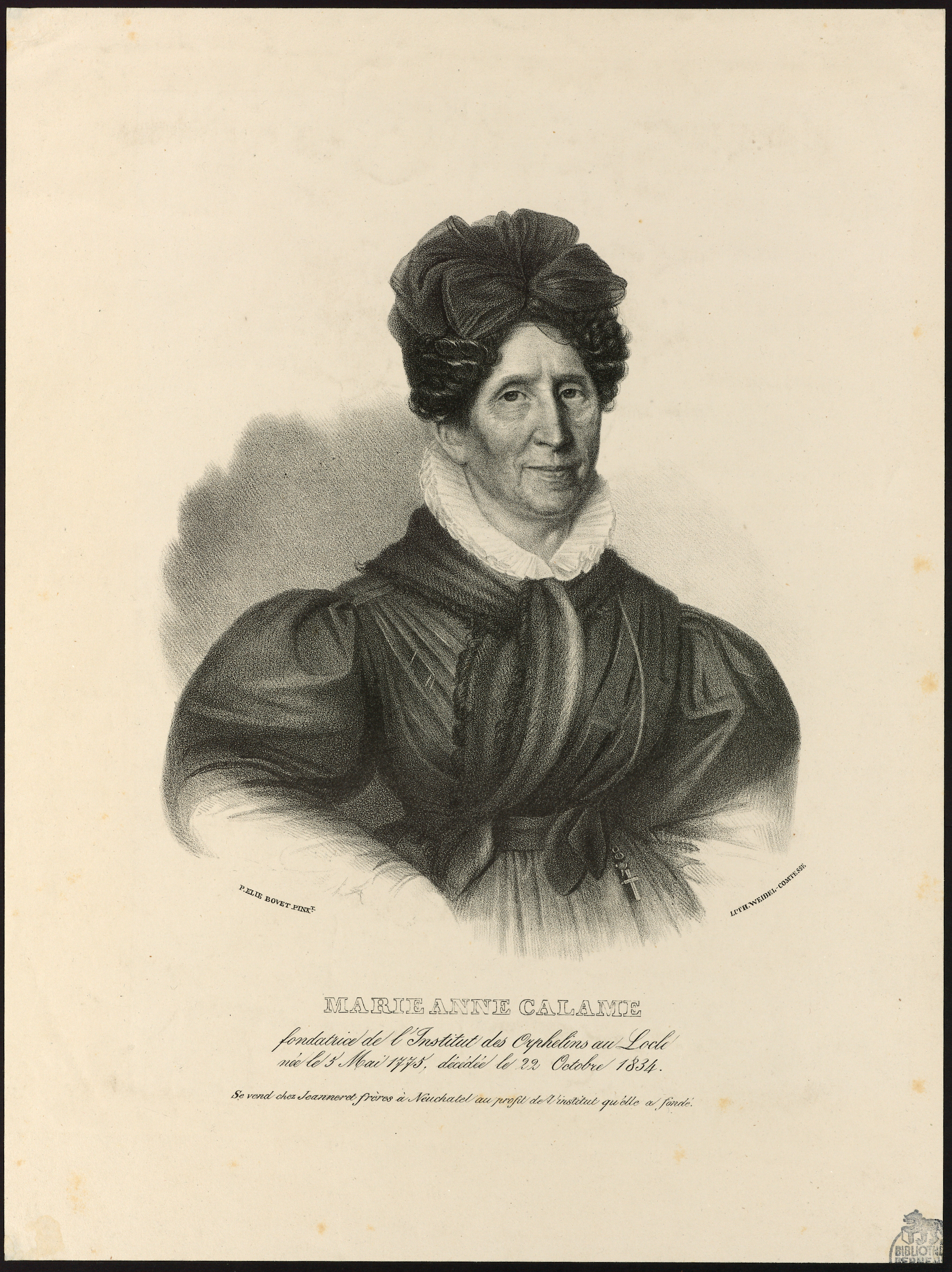 Porträt Marie-Anne Calame (1775-1834).